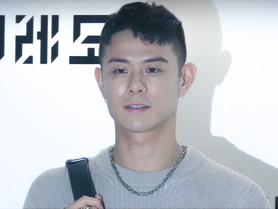 21일 오후 서울시 강남구 신사동 유러피안 퍼퓸 브랜드 '바이레도(BYREDO)'의 아시아 최초 플래그십 스토어 오픈 기념행사을 위해 빈지노, 홍종현이 참석해 포토타임을 갖고 있다. 바이레도는 2006년 스웨덴 스톡홀름에서 탄생해 창립자 '벤 고햄(Ben Gorham)'과 저명한 조향사 '올리비아 자코베티', '제롬 에피네트'가 만든 세상에 없던 독창적인 바이레도만의 향기로 지금까지 명성을 이어나가고 있다.